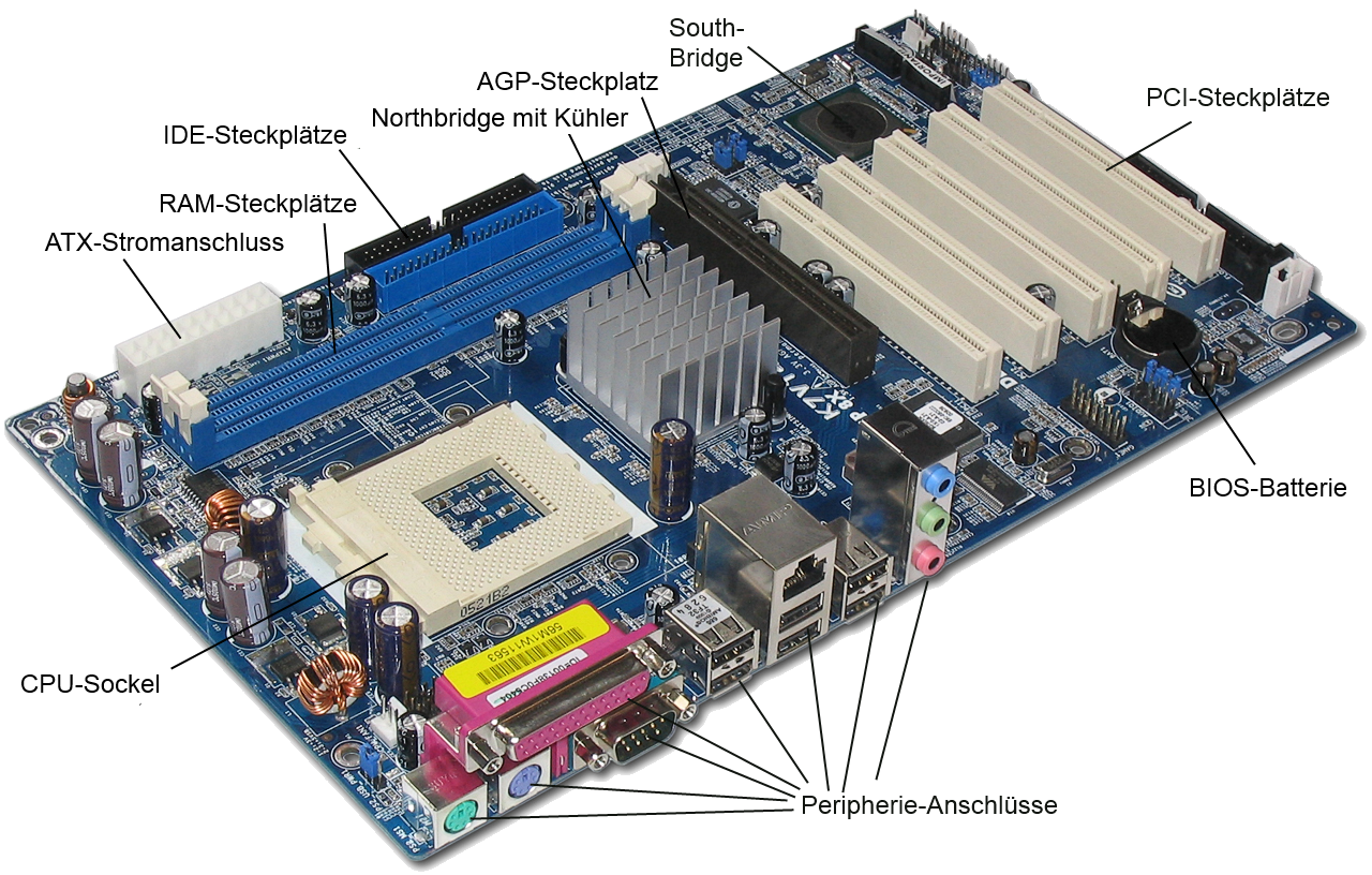 ASRock K7VT4A Pro – Mainboard / Motherboard / Hauptplatine / VIA KT400A chipset